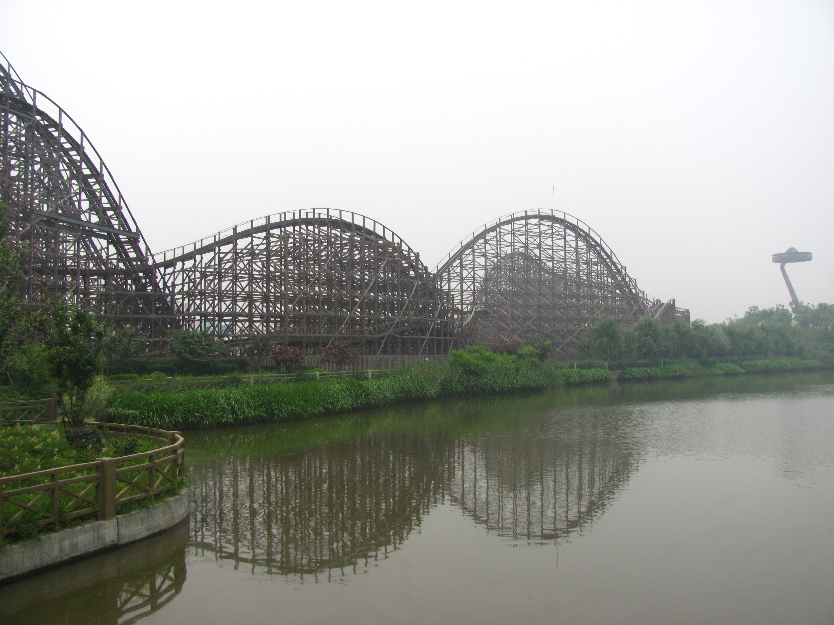 Happy Valley Shanghai